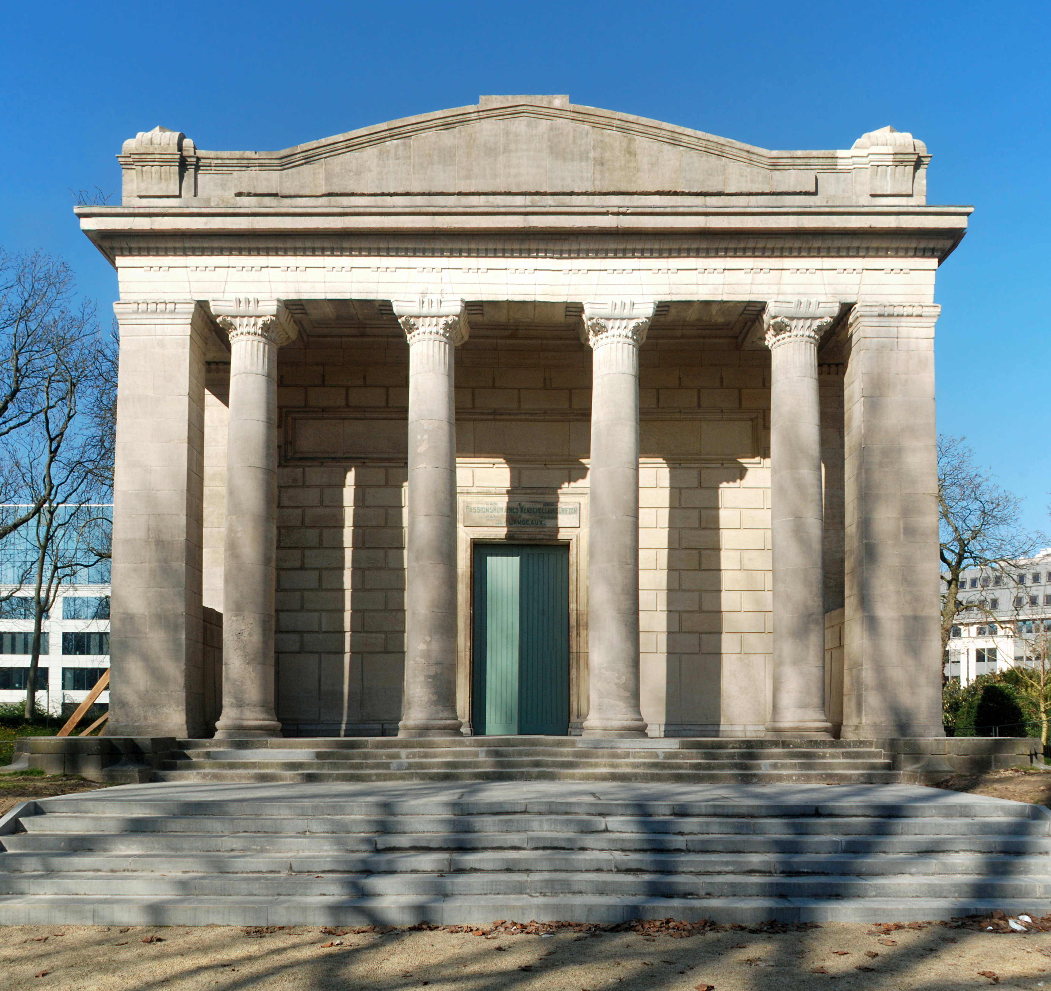 Belgique - Bruxelles - Pavillon des Passions humaines (architecte Victor Horta - 1890-1897)